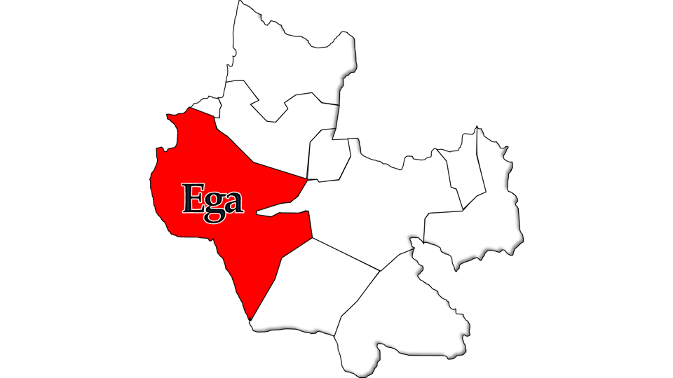 População